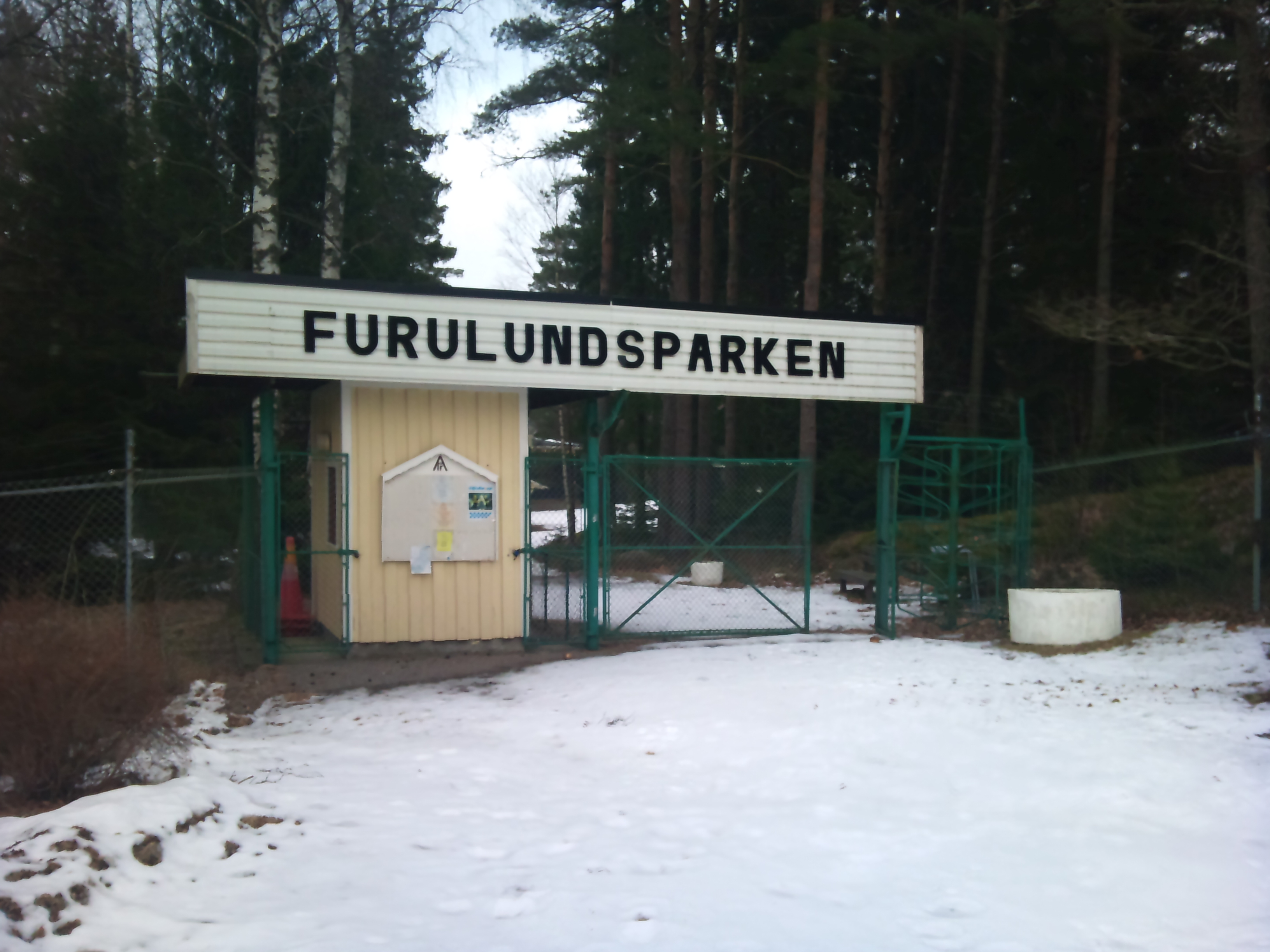 Ingången till furulundsparken